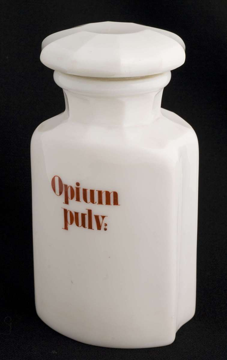 Standglass i laboratoriestil. Pulverglass med gripekant. Tilhører Norsk Farmasihistorisk Museum. NFA.18072AB.